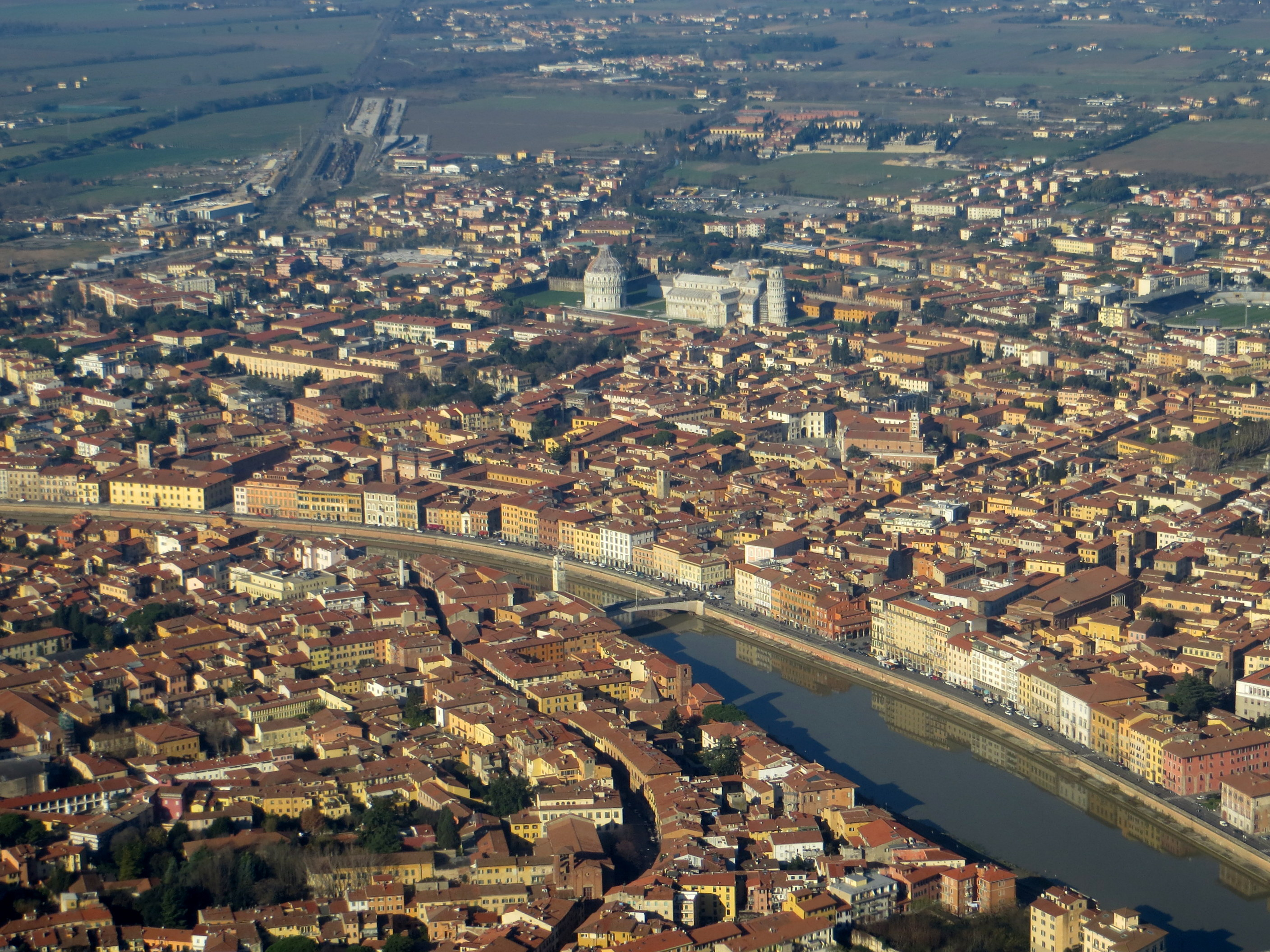 Veduta di Pisa dall'aereo